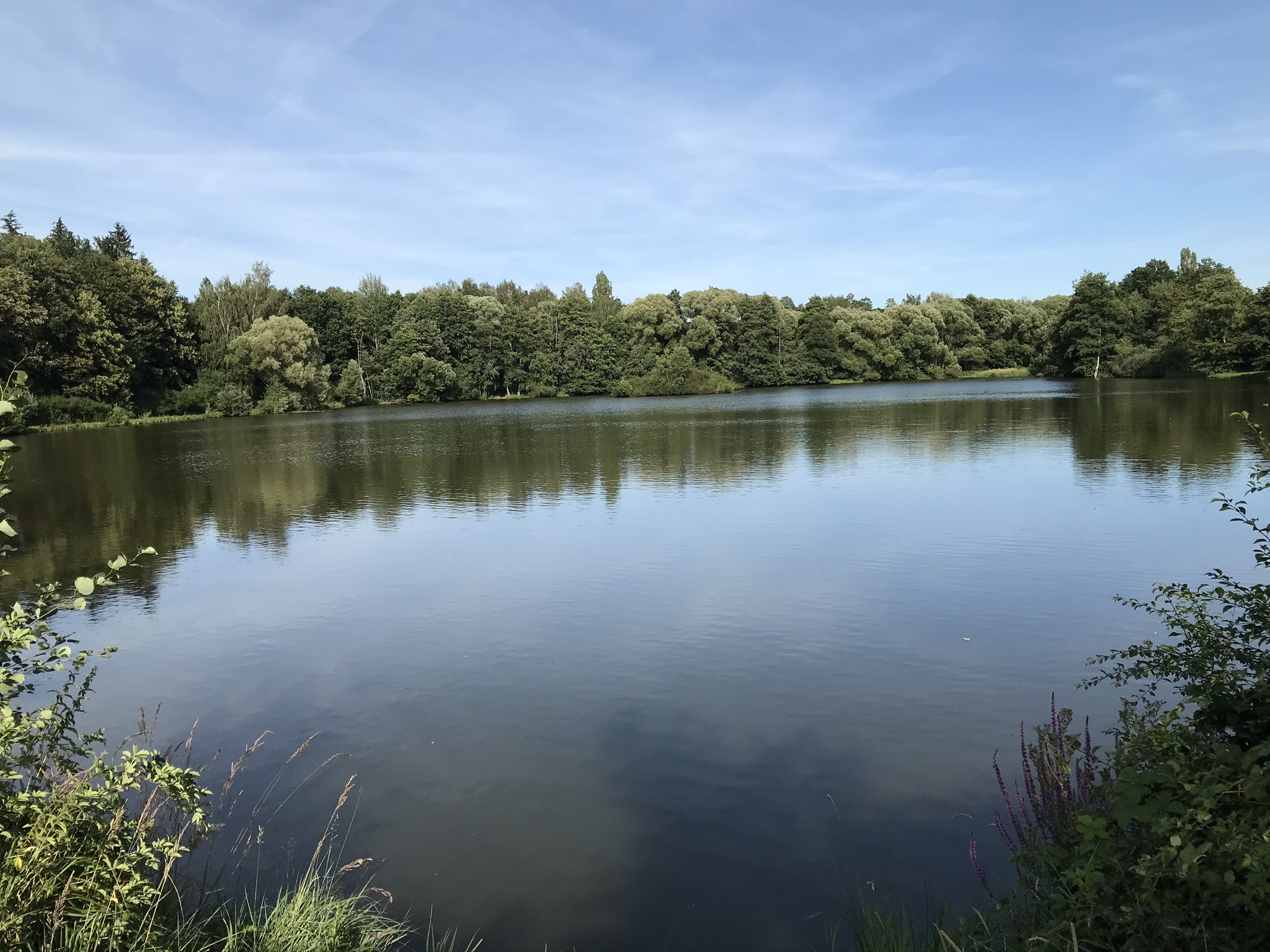 Pohled na rybník Tampák v Blovicích